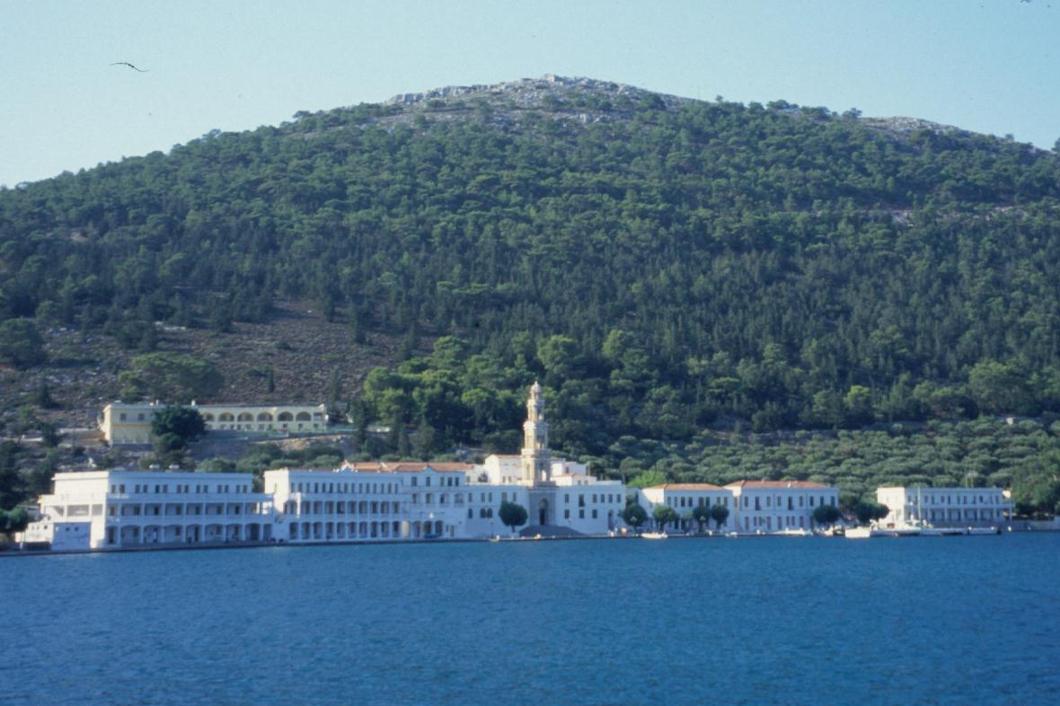 Klosteranlage Panormitis auf Simi